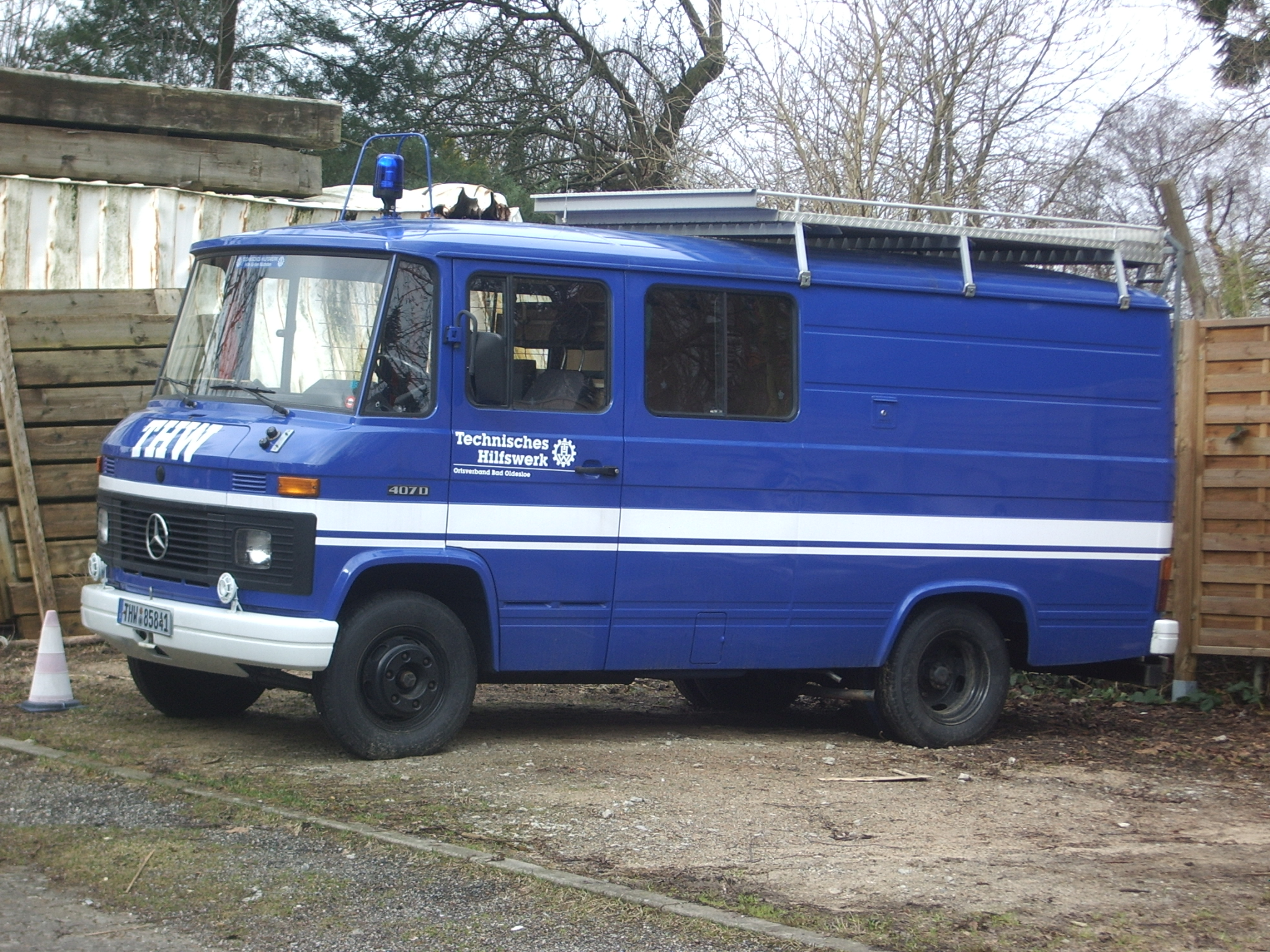 Führungskraftwagen FüKw des Ortsverbandes OV des Technischen Hilfswerk THW in Bad Oldesloe